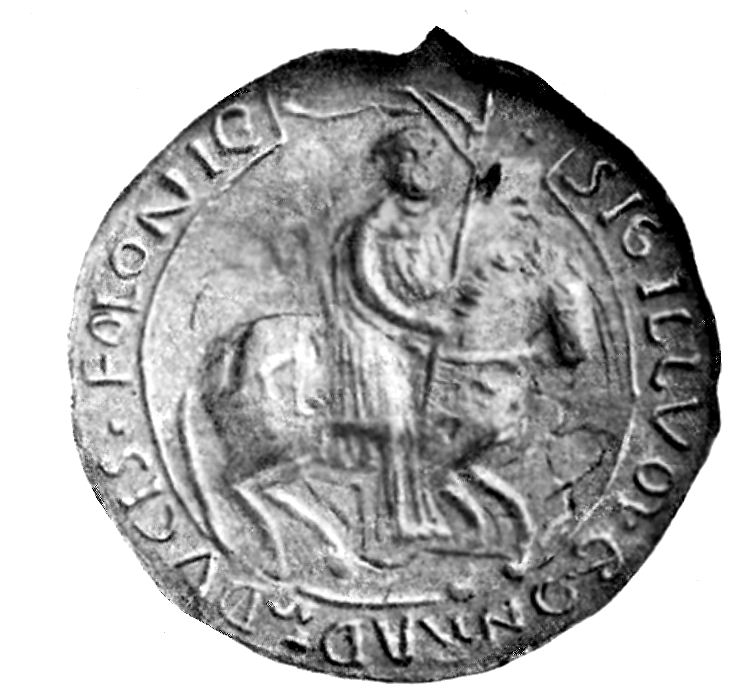 Konarad I Mazowiecki seal